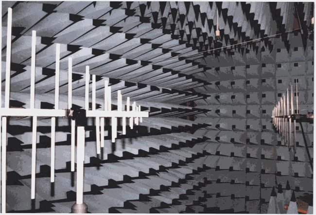 اتاق RF